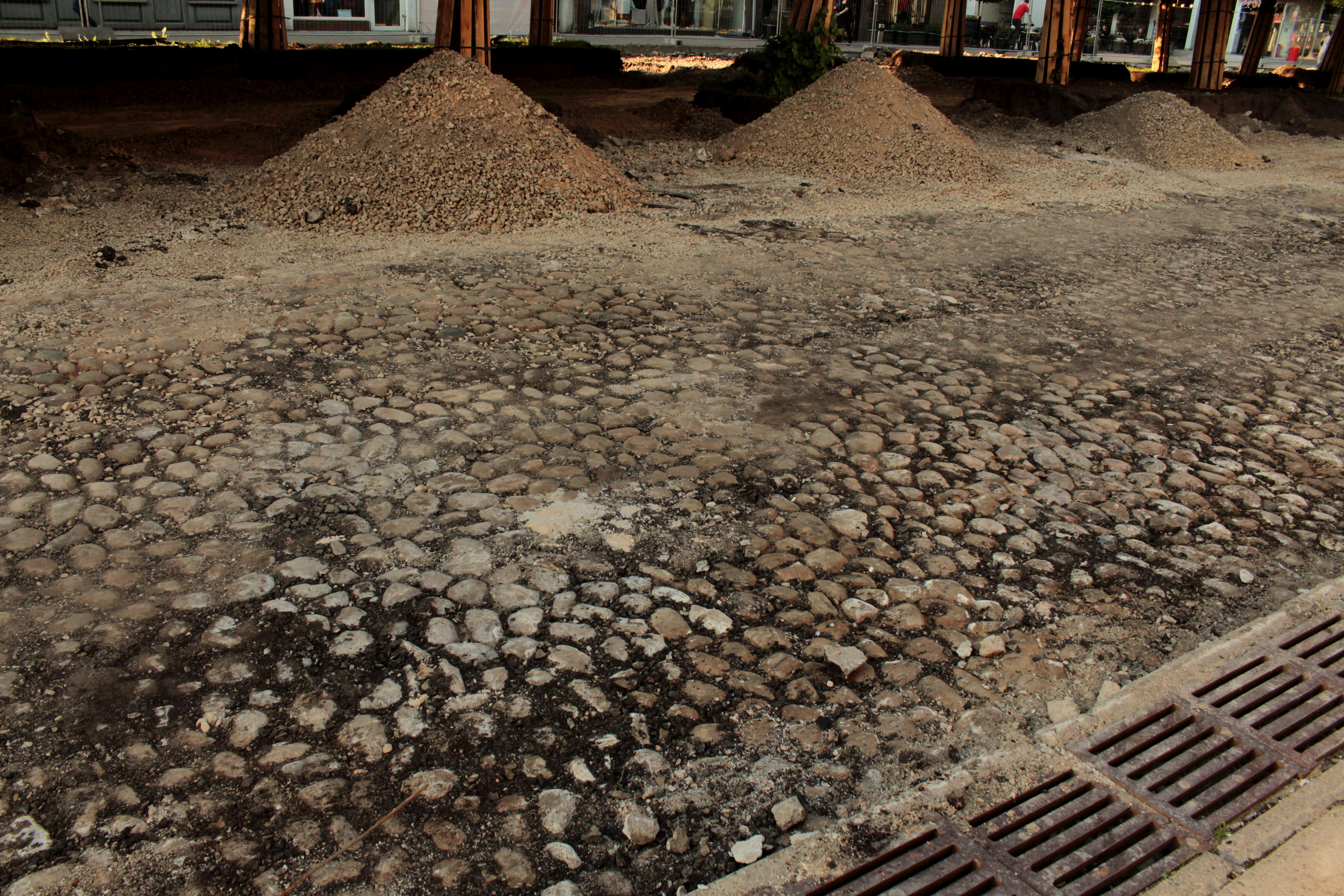 XIX a. Laisvės Alėjos grindinys